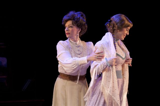 מוניקה ורדימון בהצגה האוצר של נפוליון